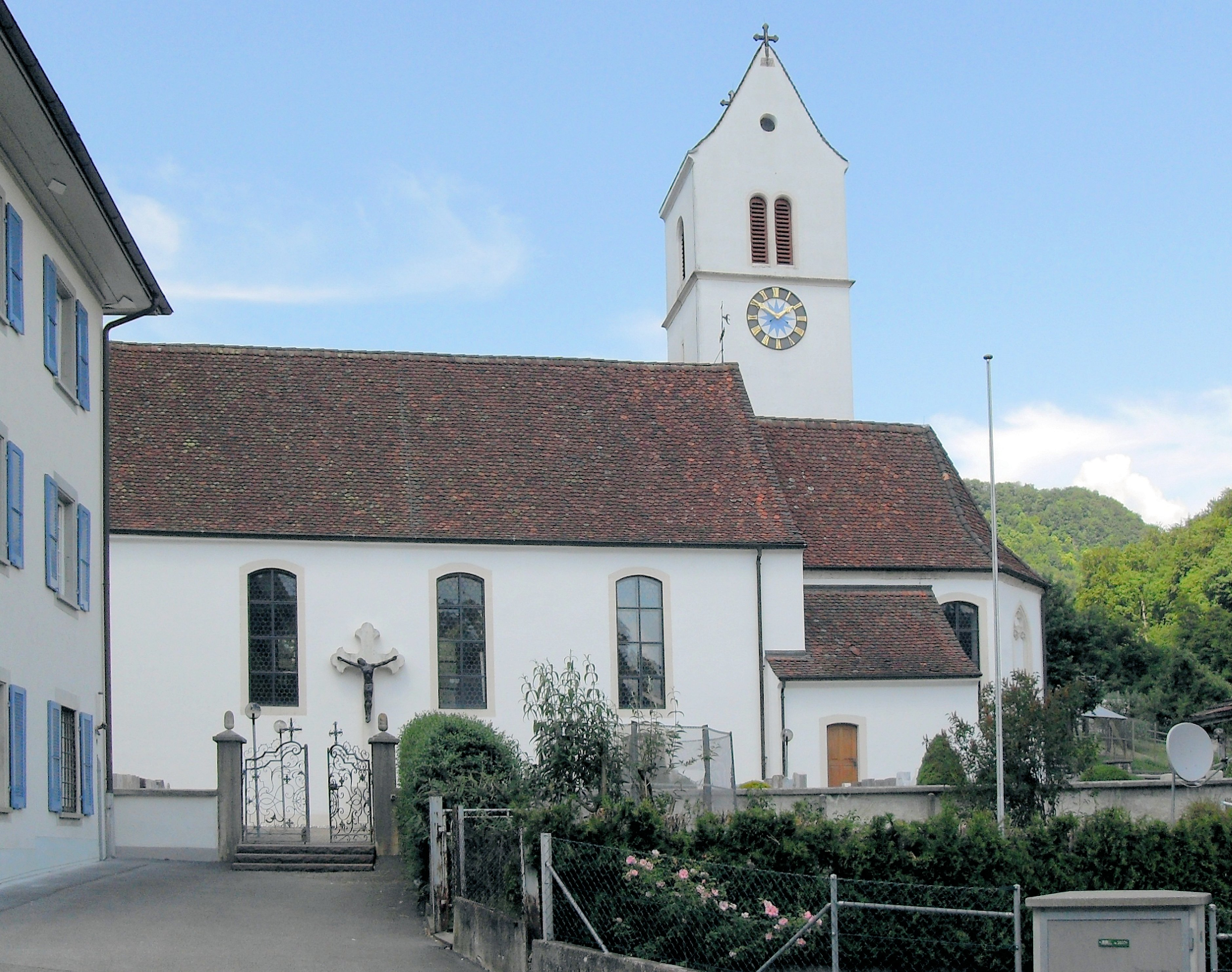 Kirche St. Martin in Büren, Kanton Solothurn, Schweiz